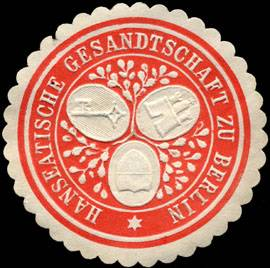 Sealing stamp Title: Hanseatische Gesandtschaft zu Berlin Description: rot, weiß, geprägt Place: Berlin size: 4 cm